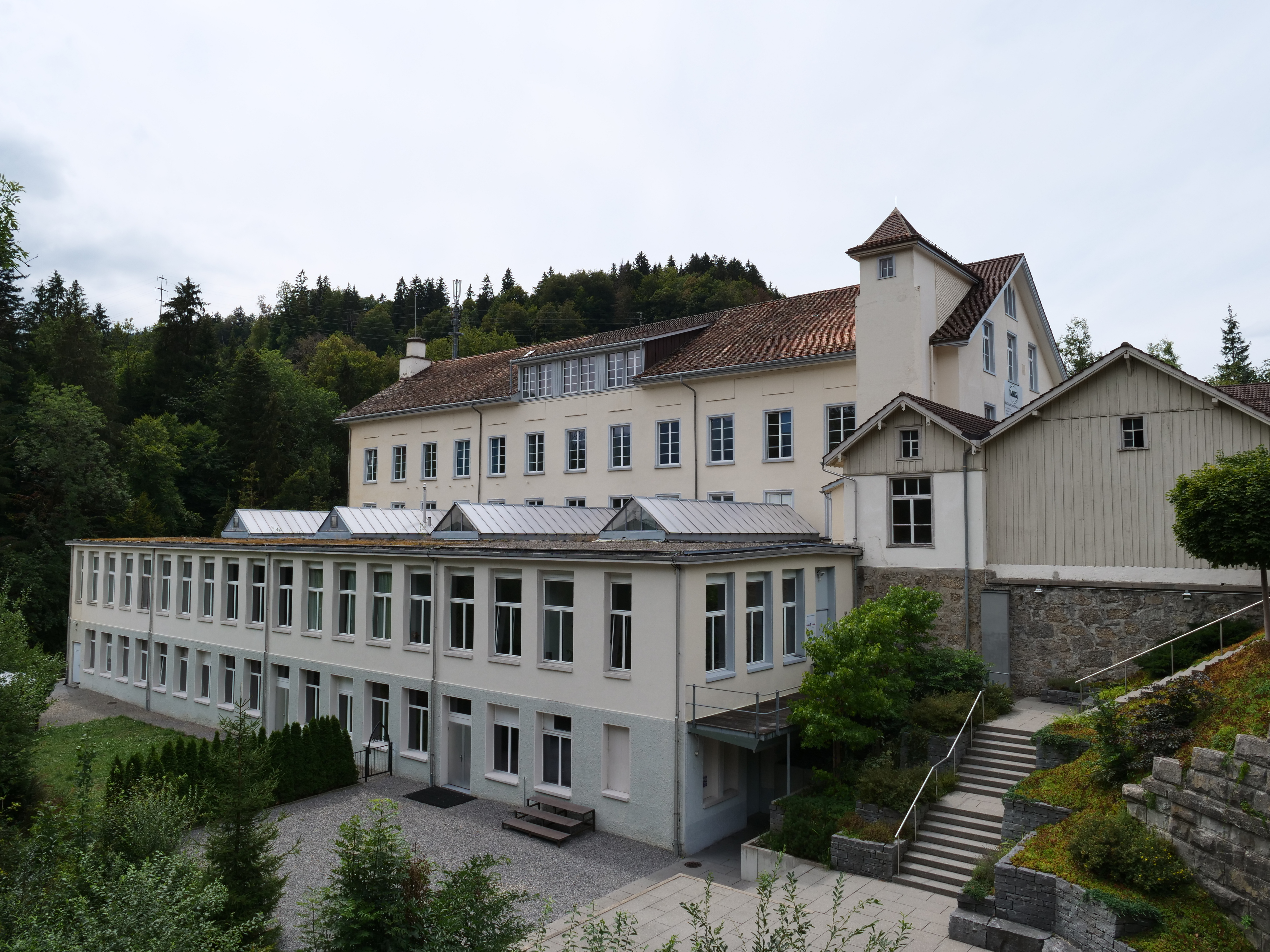 Nord - und Ostseite der ehemaligen Weberei Trempel.